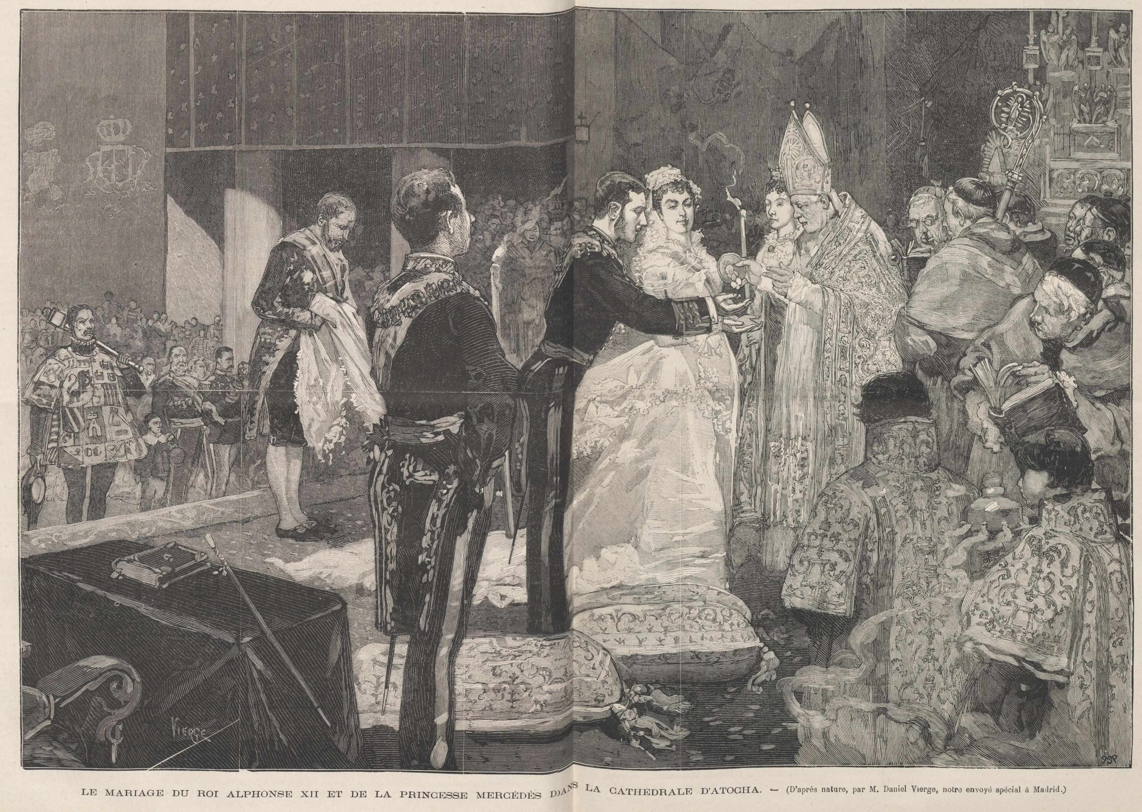 Le mariage du roi Alphonse XII et de la princesse Mercédés dans la cathédrale d'Atocha, de Vierge, dibujo de Vierge, en la revista Le Monde Illustré.